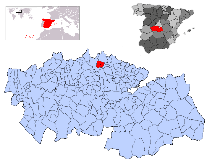 La Torre de Esteban Hambrán en la provincia de Toledo